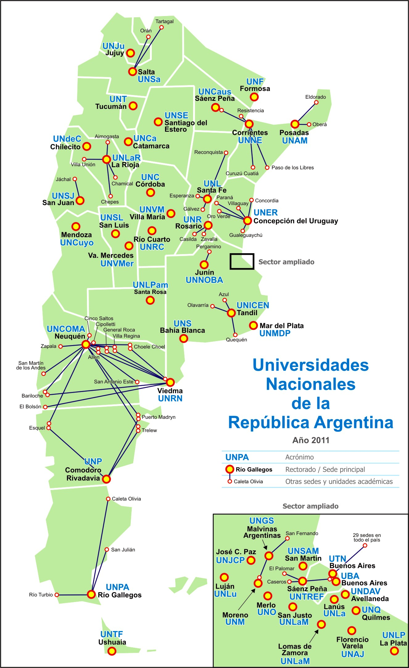 Universidades nacionales de la República Argentina. Potential conflict with the law of the Charter of Argentina No. 22,963 (Article 1 Representation of Continental Territory, Insular and Antarctic Argentina, published in the country in literary or graphic form with. any format and purpose, as well as from abroad destined to be distributed in the country, it must strictly conform to the official cartography established by the National Executive through the Military Geographical Institute (now the National Geographic Institute). It should include the Antarctic Sector Argentino. This comment serves the purposes of future claims by foreign powers, it is customary to publish the letter of Argentina bi-continental.